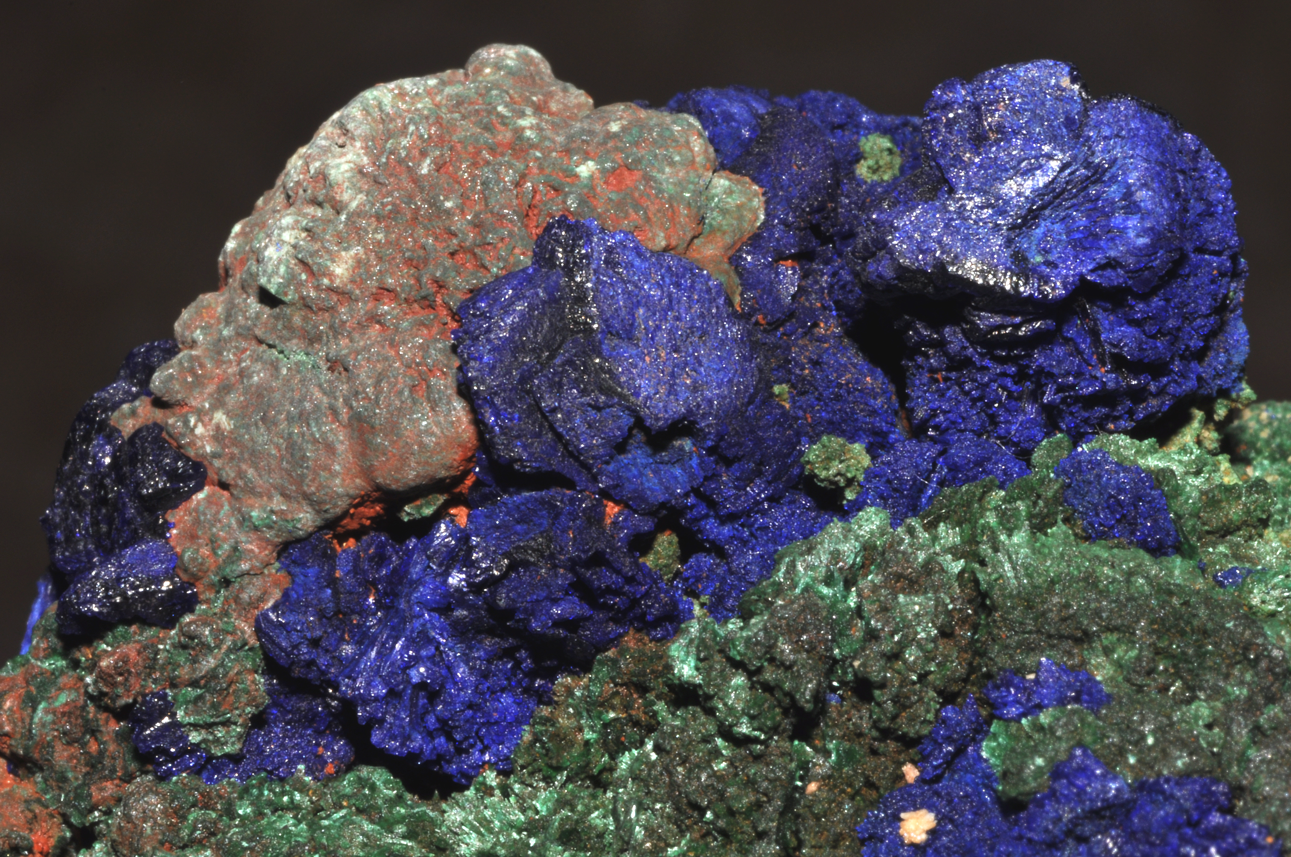 Cristaux d' Azurite de Malachite sur Cuivre